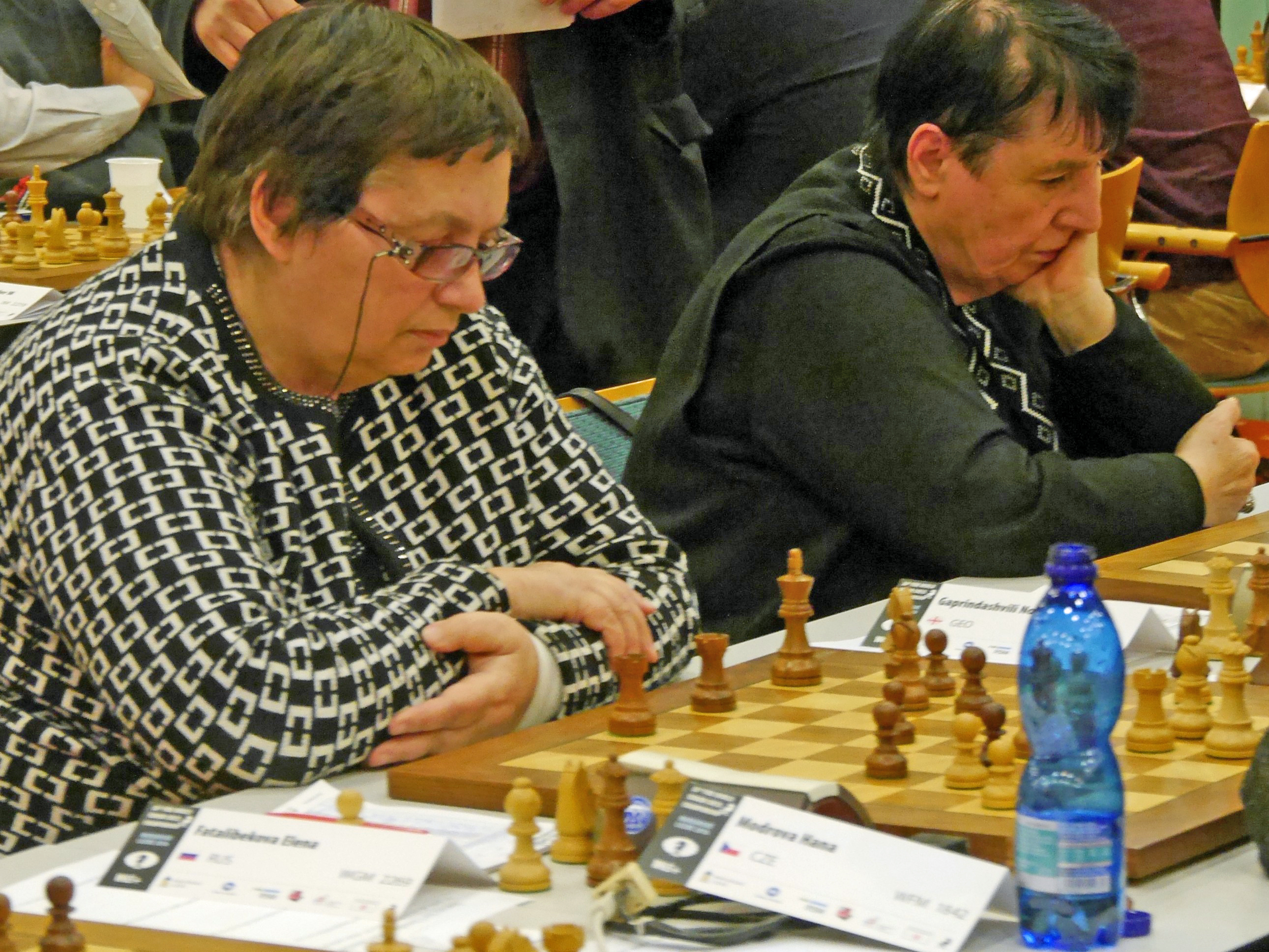 Elena Fatalibekova und Nona Gaprindashvili, Schachweltmeisterschaft der Seniorinnen 2016 in Marienbad.